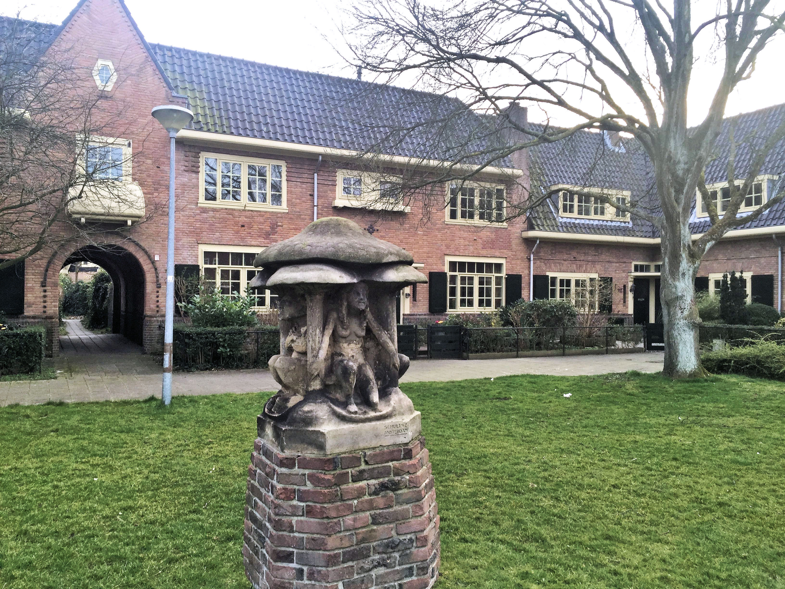 Sculptuur ter herinnering aan de bouw gvan Onder Dak in Haarlem geplaatst in 1923 en een werk van J.Schultsz. Het is circa 1.80 meter hoog en bestaat uit een achtzijdige bakstenen sokkel met daarop een natuurstenen beeld.